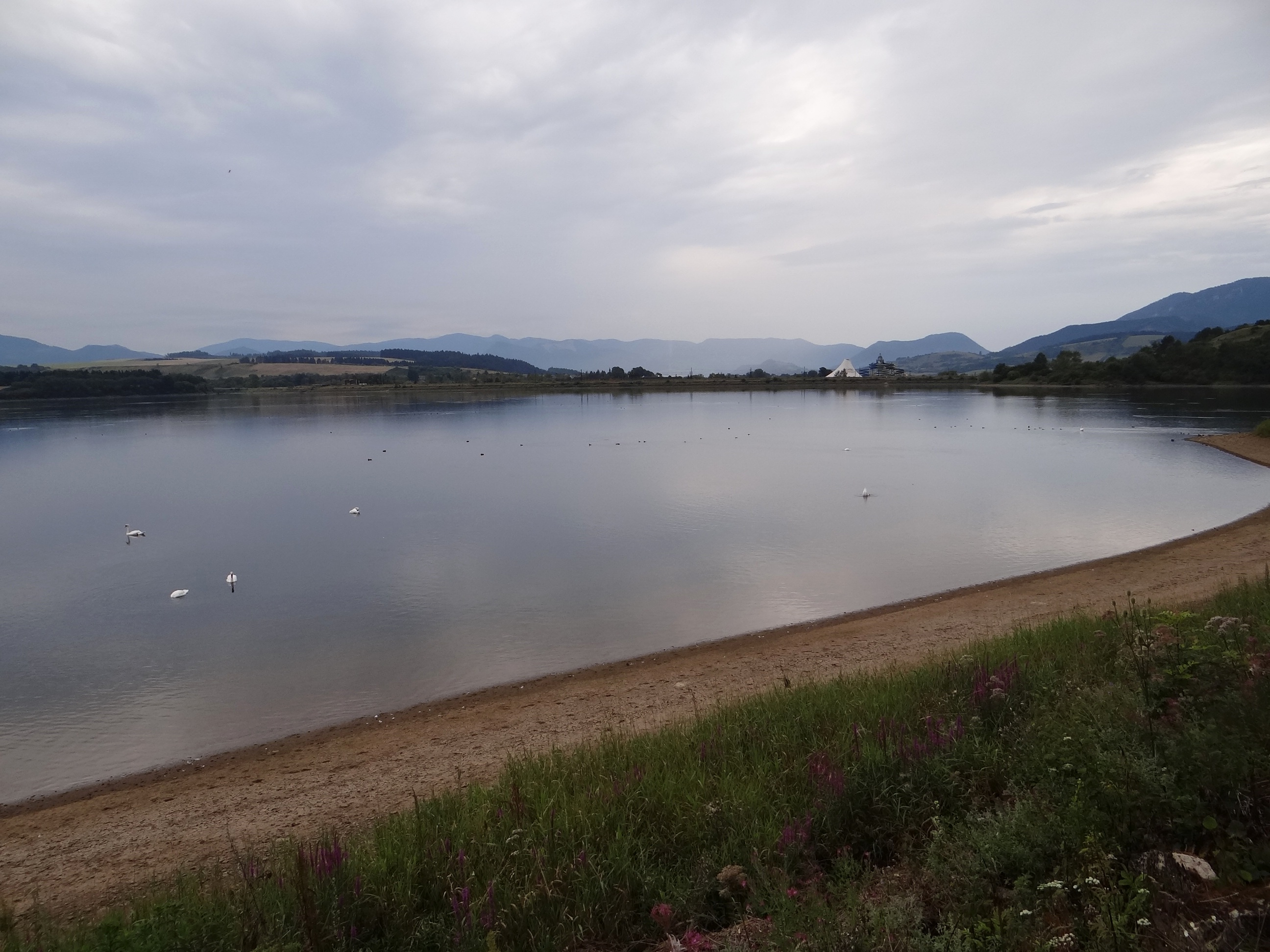 Vodní nádrž Bešeňová